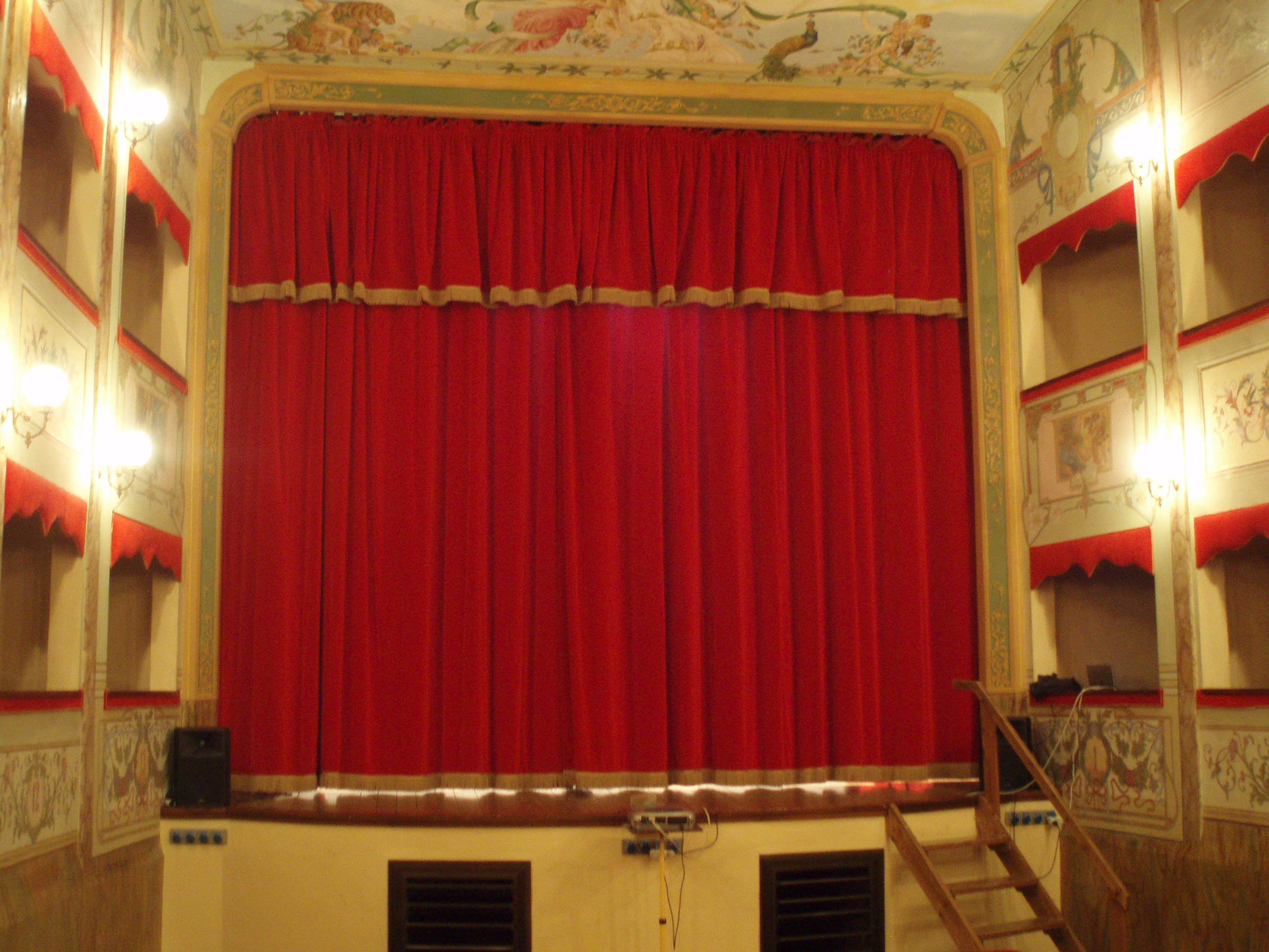 Teatro Mario Tiberini di San Lorenzo in Campo - 13.JPG